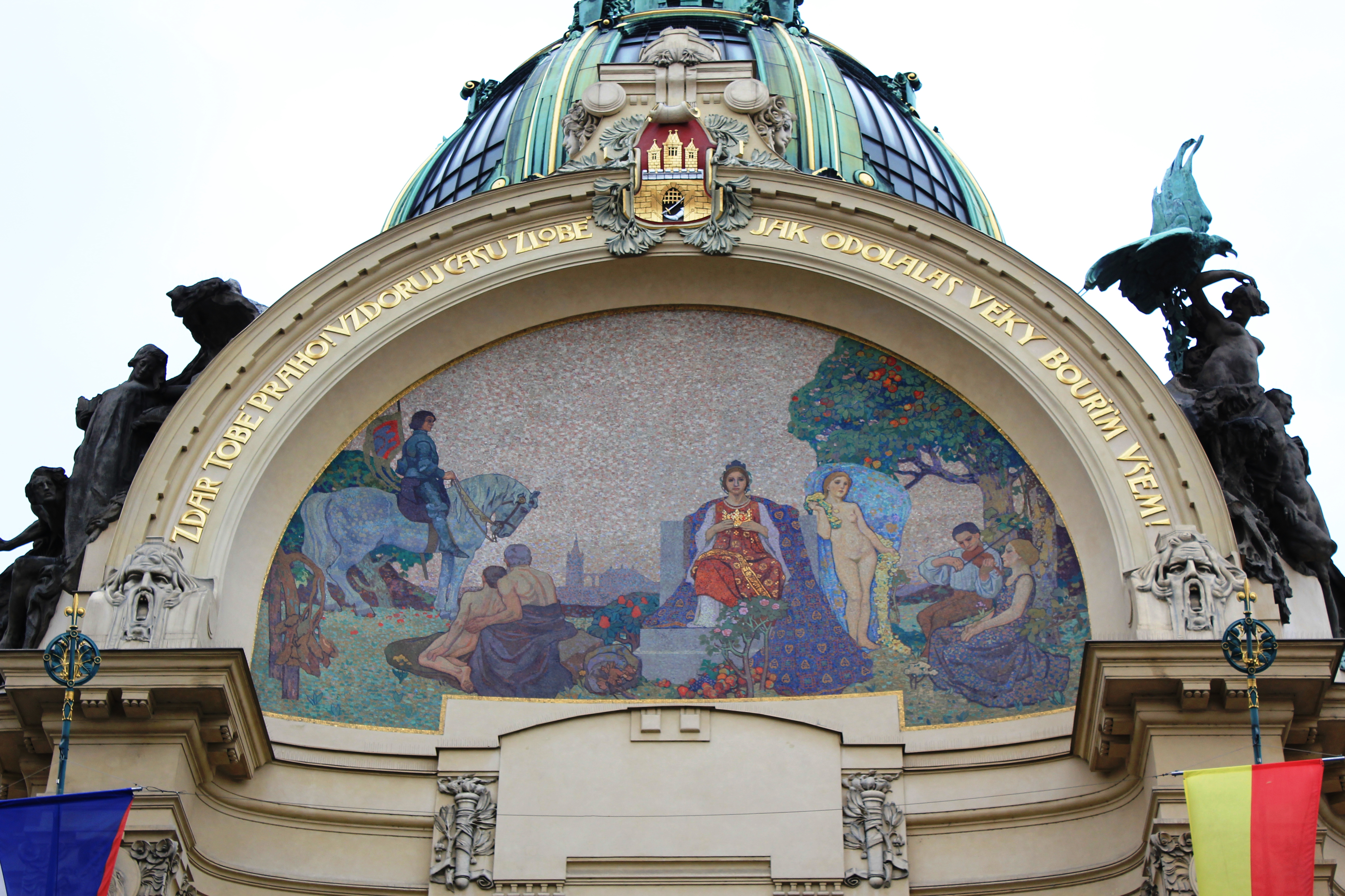 Obnesci Dum representasjonshuset